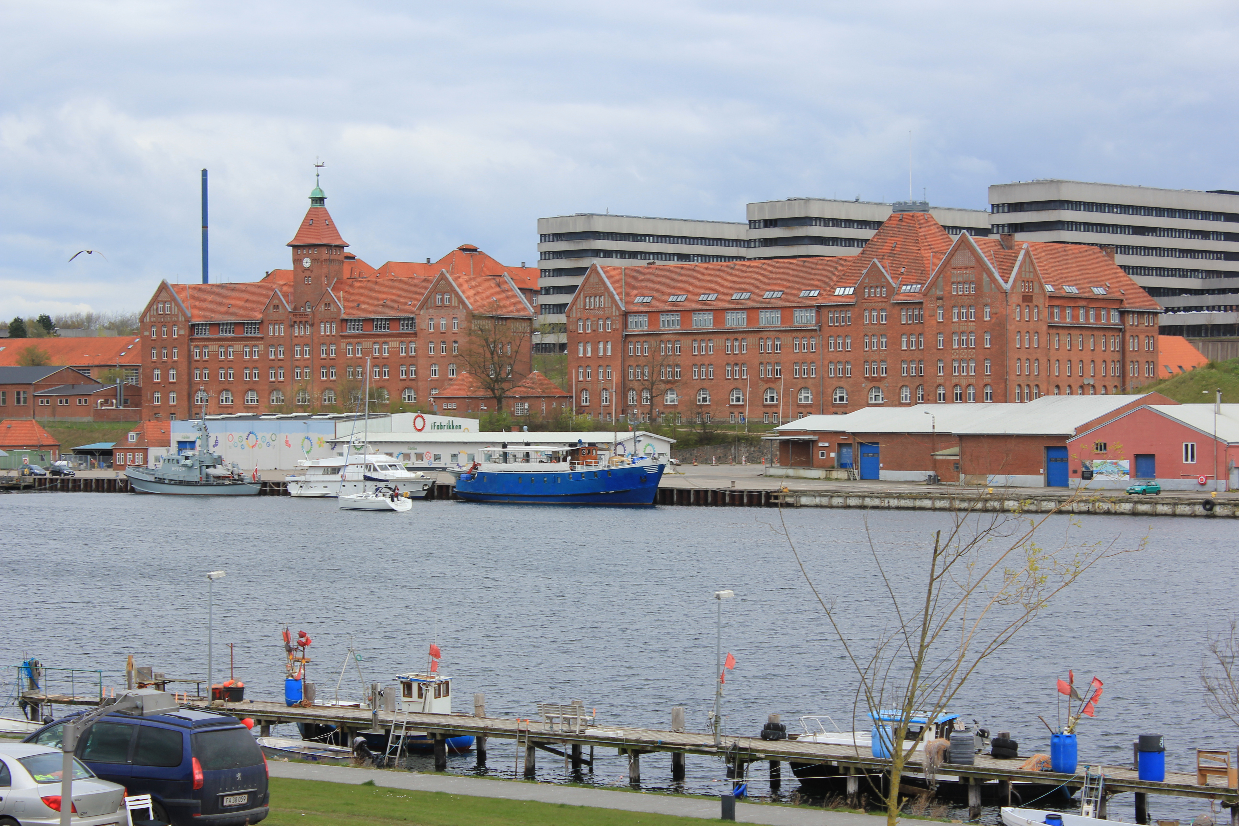 Die Sonderburg Kaserne (2014), Bild 002